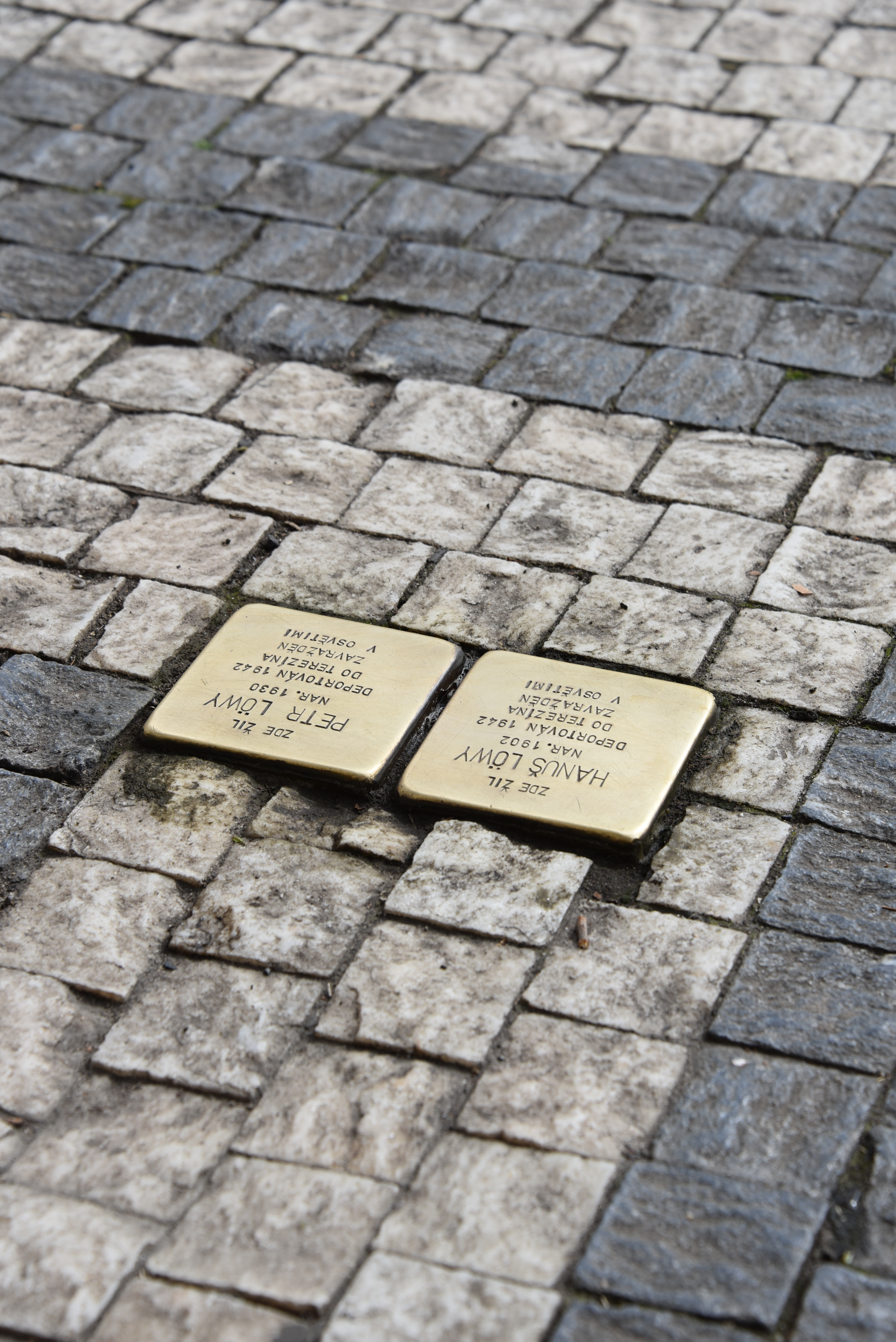 Stolpersteine für Hanus und Petr Löwy in Prag